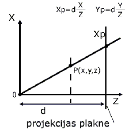 Šeit attēlota apgrieztās perspektīvas konstruēšana.